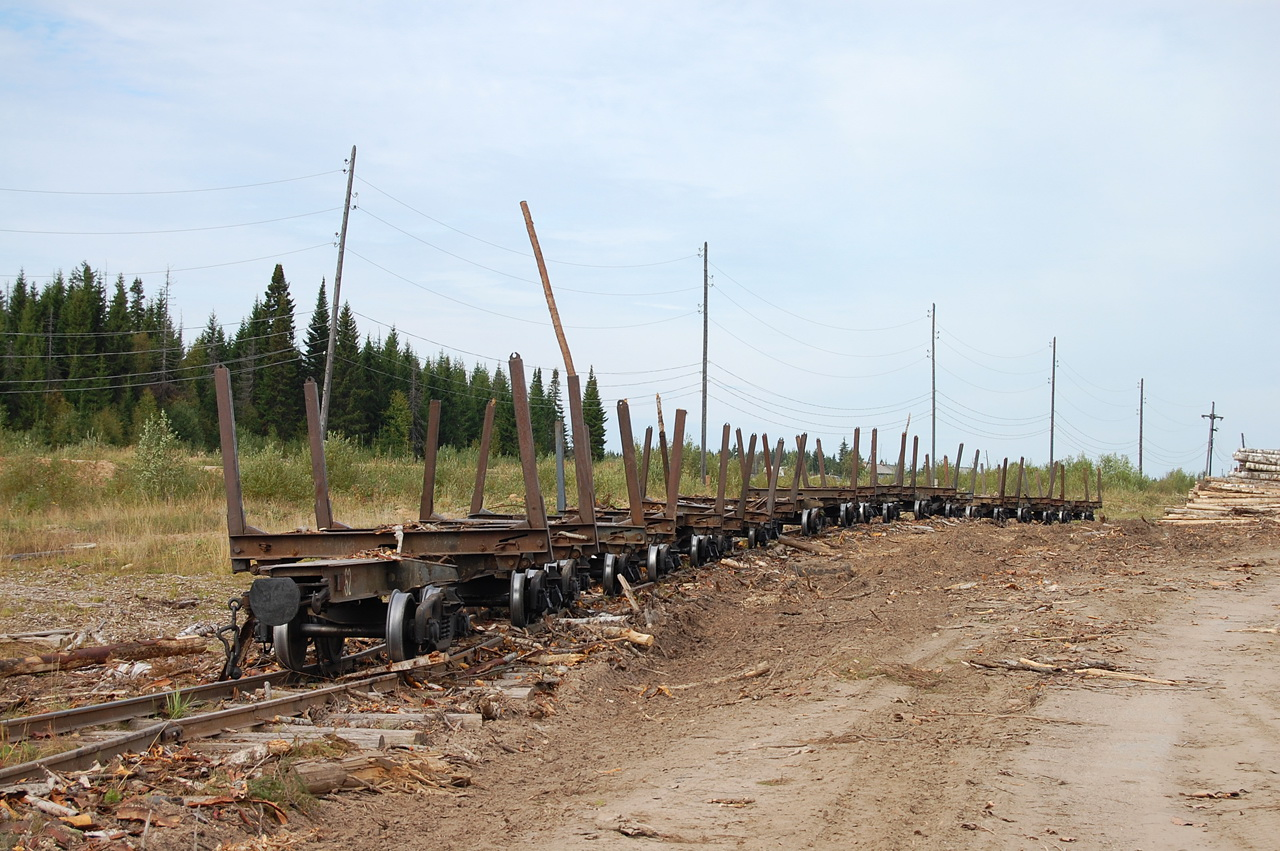 Сцепы, Удимская УЖД